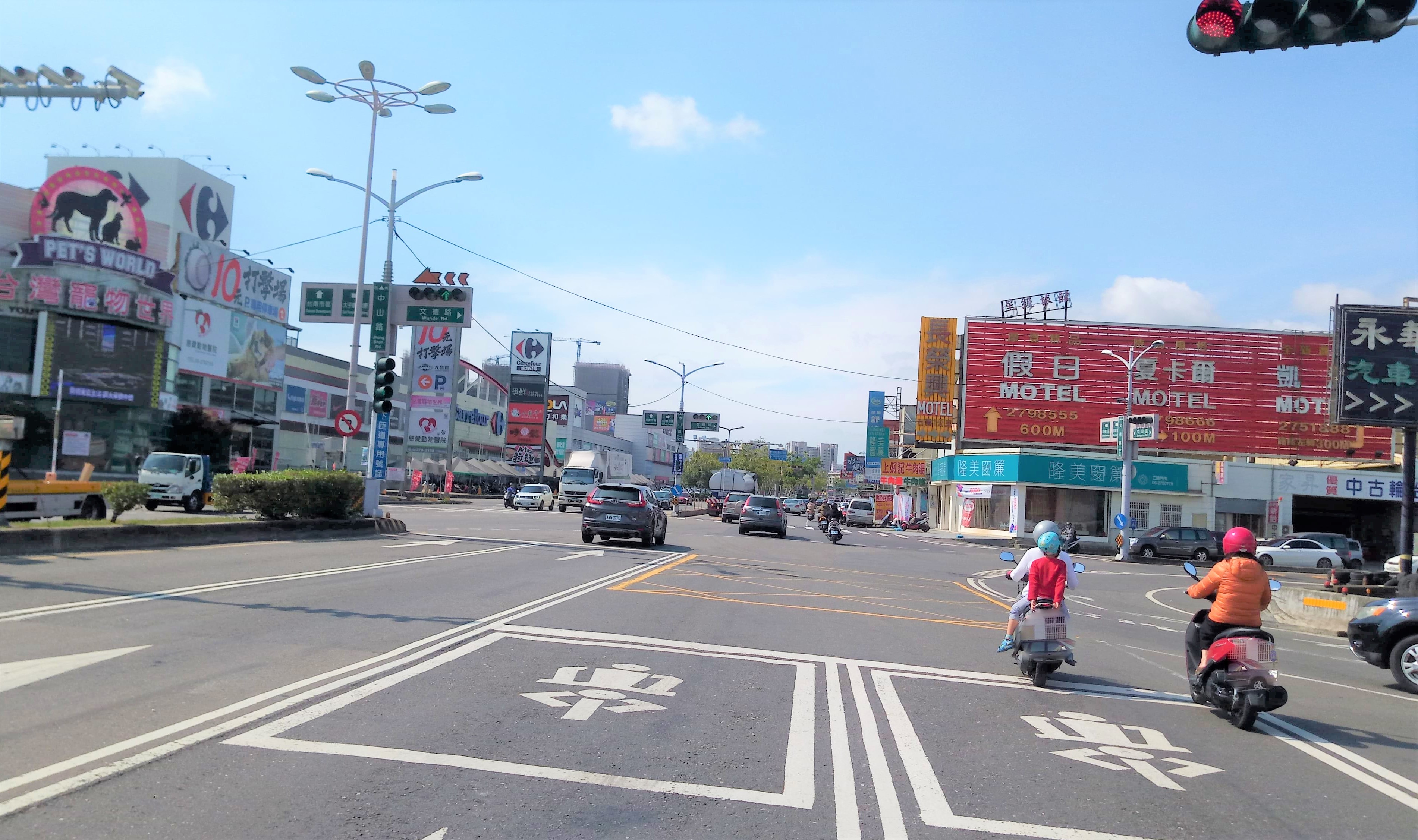 台南仁德中山路家樂福特力屋